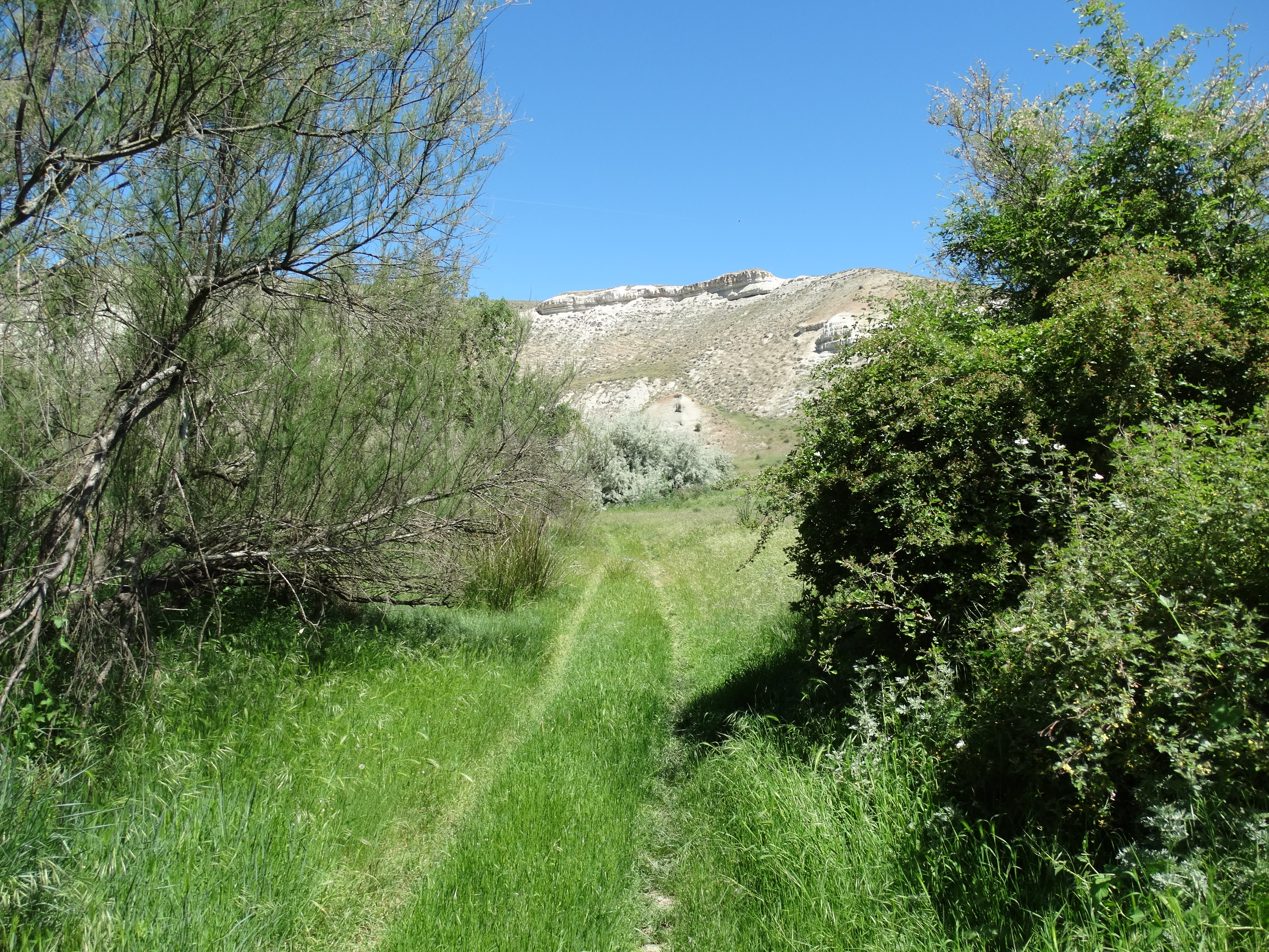 Los Cortados de Peñalba que caen desde la meseta al río Duero. Camino paralelo al río Duero que sigue la ruta de lo que fue el Camino de Aragón y que conduce a la localidad hoy despoblada de Peñalba de Duero en el término de Villabáñez, Valladolid, España.